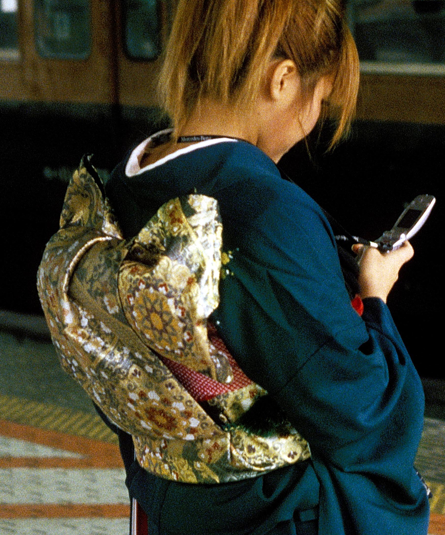 depixelized Kimono & obi (belt) photo:Ziga 19:07, 19 January 2007 (UTC)